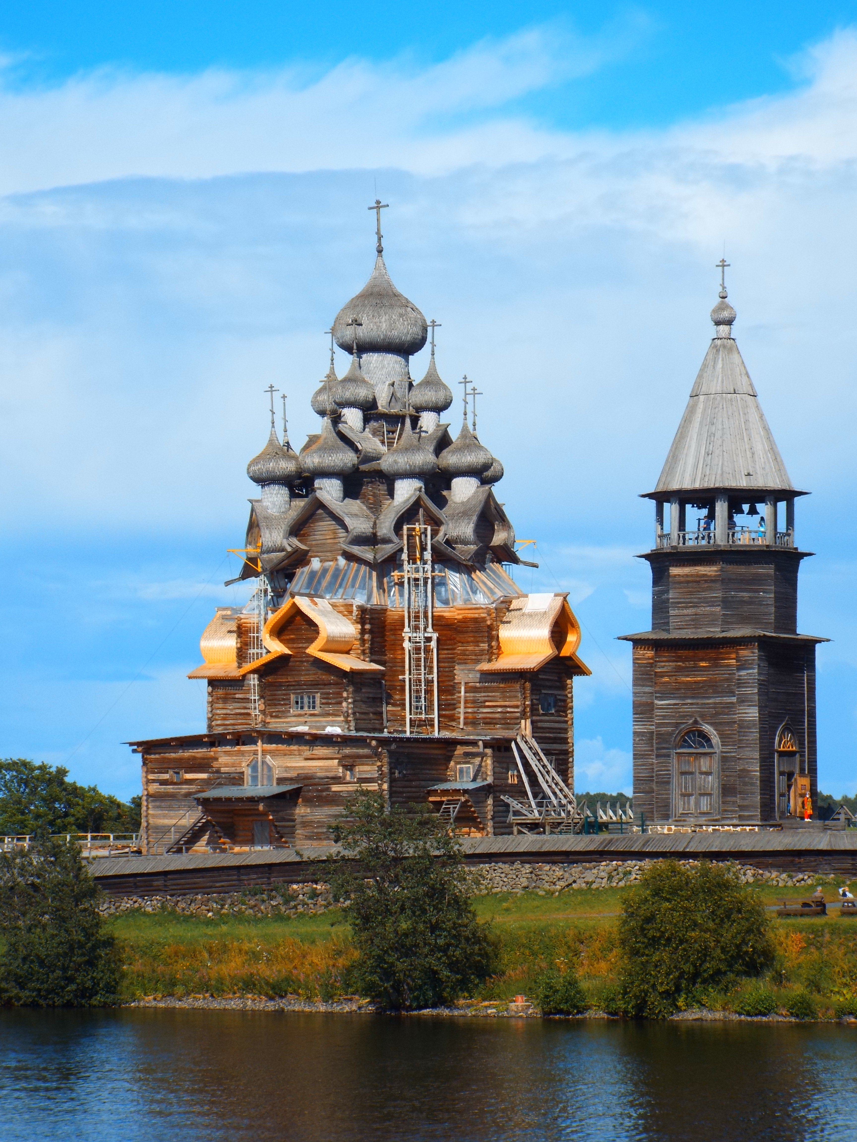 Церковь Преображения Господня: остров Кижи, Медвежьегорский район, Карелия